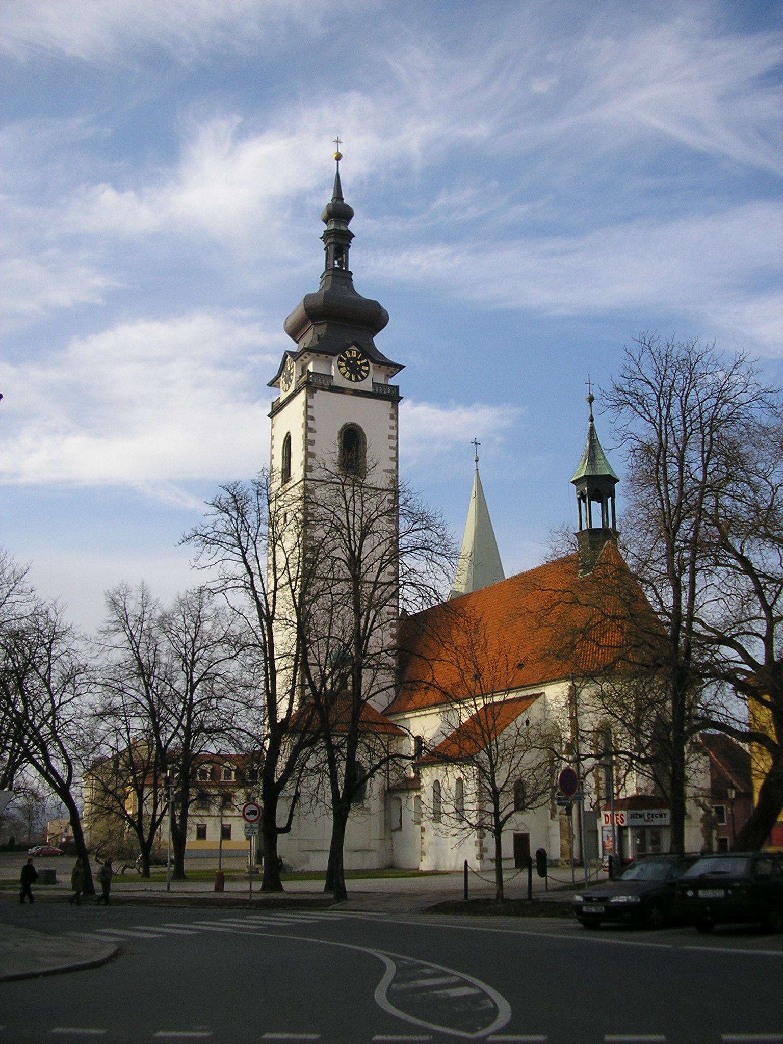 Kostel Narození Panny Marie, Bakaláře, Vnitřní Město, Písek (město).